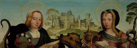 Este quadro, bem como "Santa Luzia e Santa Ágata" (Museu Nacional de Arte Antiga), provem da ermida lisboeta do Paraíso. Duas outras pinturas que hoje se encontram no Museu de Posen, na Polónia ("Santa Apolónia e Santa Inês" e "Santa Catarina e Santa Bárbara"), com idêntico formato e composição, foram compradas em Lisboa no ano de 1844 pelo Conde Atanazy Raczynski, tendo pertencido à Galeria do Marquês de Penalva. Carl Justi atribuíu este conjunto a Velascus e José de Figueiredo, aludindo às pinturas de Posen, menciona o nome de Cristóvão de Figueiredo. Luís Reis-Santos lançou a hipótese de as quatro pinturas terem constituído as predelas do retábulo "do Paraíso" [Museu Nacional de Arte Antiga] atribuído a Gregório Lopes. Vítor Serrão (in catálogo da exposição No Tempo das Feitorias) subscreve a opinião de Reis-Santos, integrando-os na obra de Gregório Lopes.